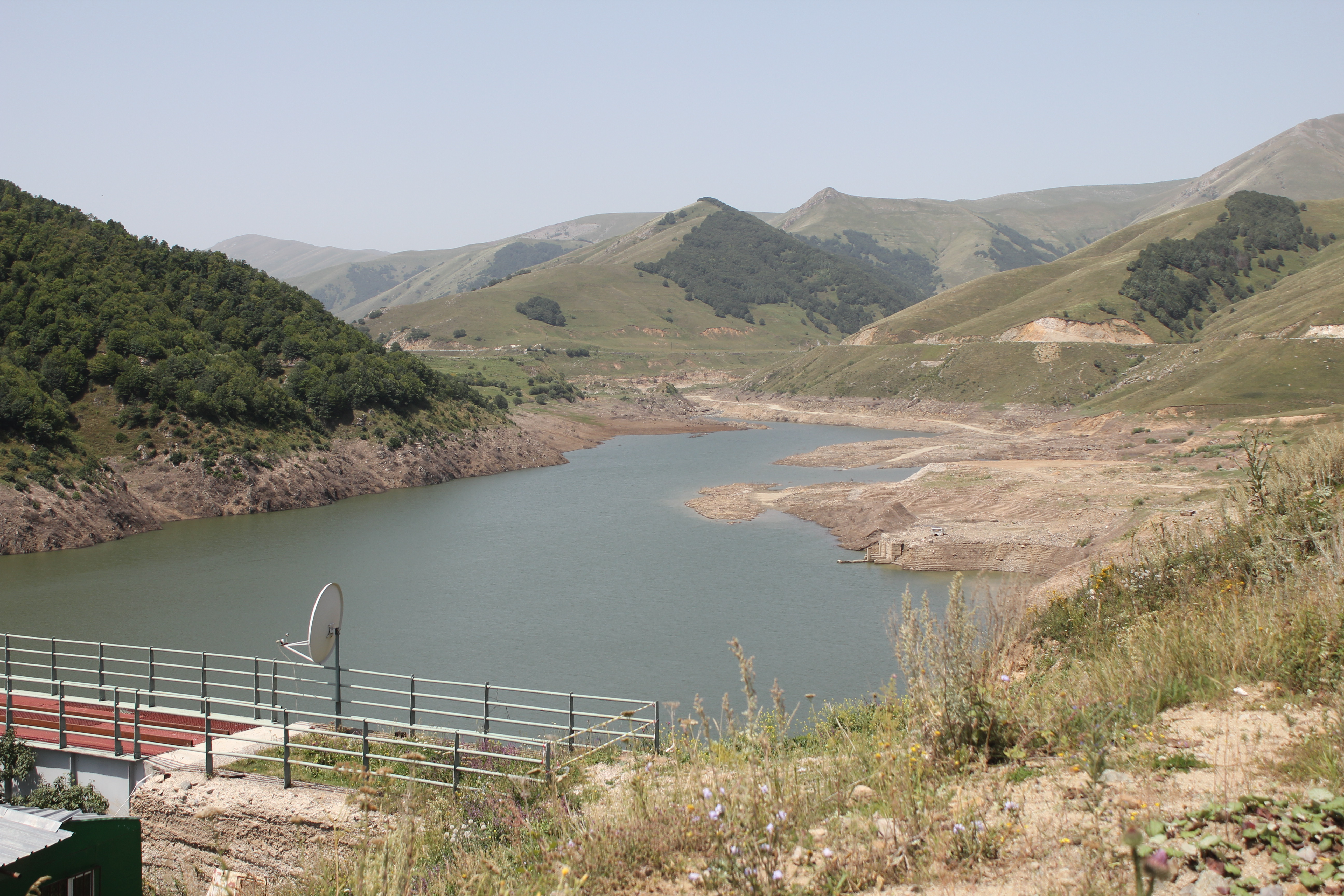 Мармарикское водохранилище, Армения. Заполнено 25% от общего объёма. Август 2012 года.